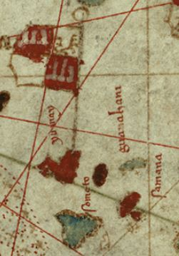 Guanahani and neighboring islands in the map of Juan de la Cosa, 1500.